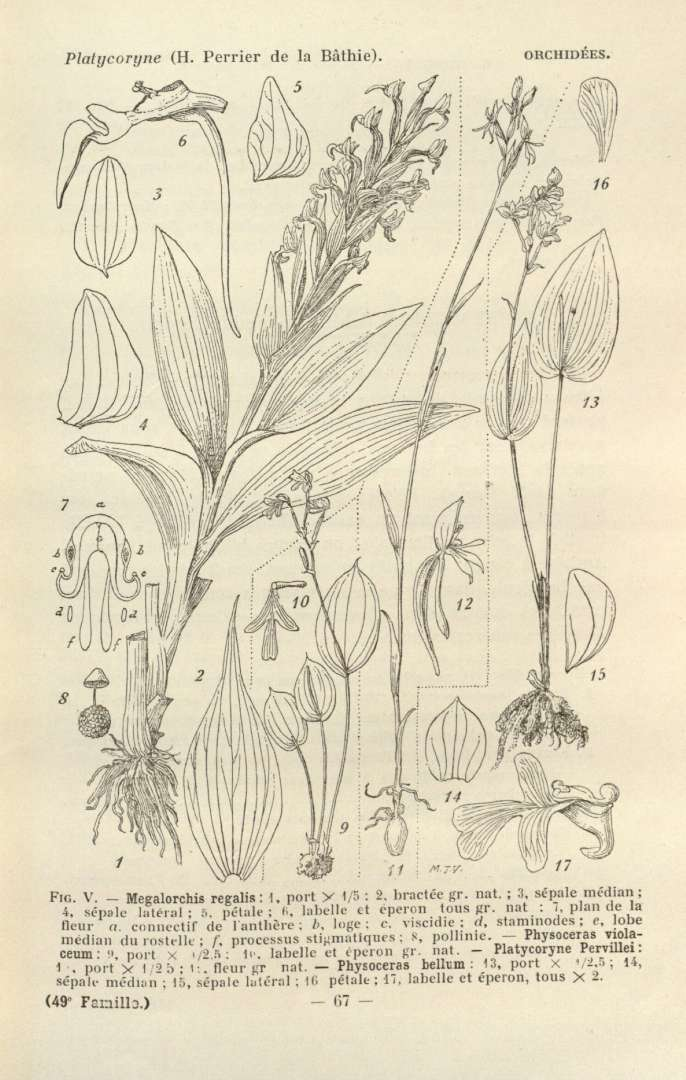 Tavola botanica tratta da Flore de Madagascar et des Comores, Orchidées.1-8 Megalorchis regalis (Schltr.) H. Perrier9-10 Physoceras violaceum Schltr., 192411-12 Platycoryne pervillei Rchb.f.13-17 Physoceras bellum Schltr., 1924